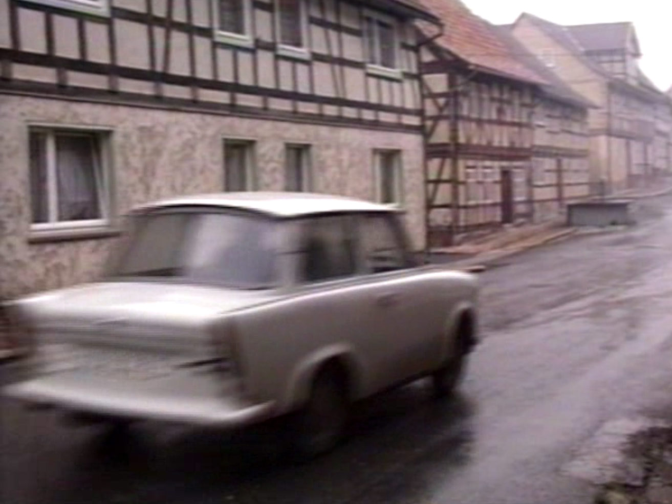 Ummerstadt, Karl Marx Straße, 1990, vermutlich November. Ein Trabant fegt im Regen die Straße entlang. Das Foto stammt von meinem Vater Wilhelm Schönherr und mir und ist einem Privatvideo entnommen.